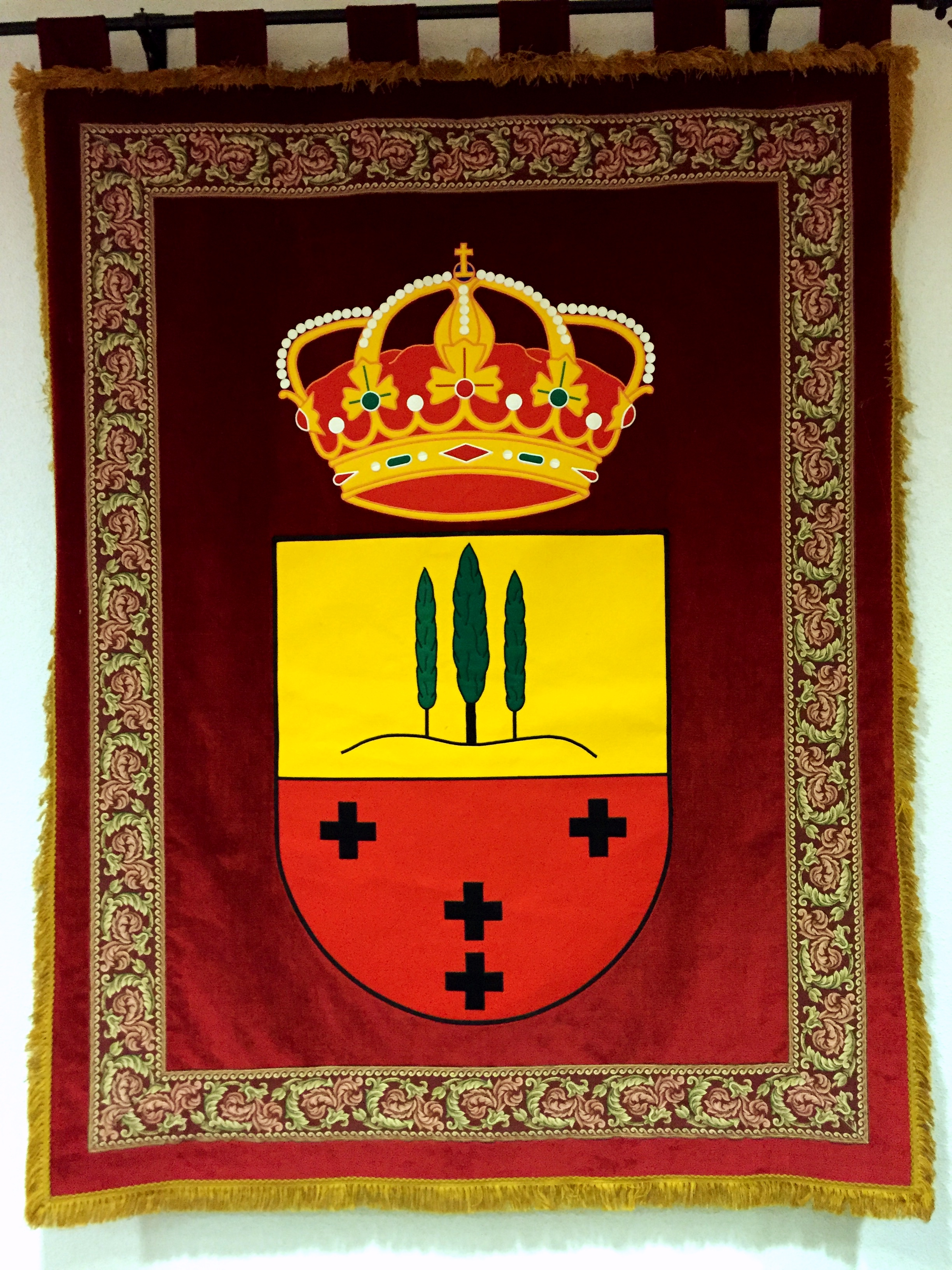 Tapiz del escudo oficial del Municipio de Quismondo que se encuentra en la Sala de Plenos del Ayuntamiento